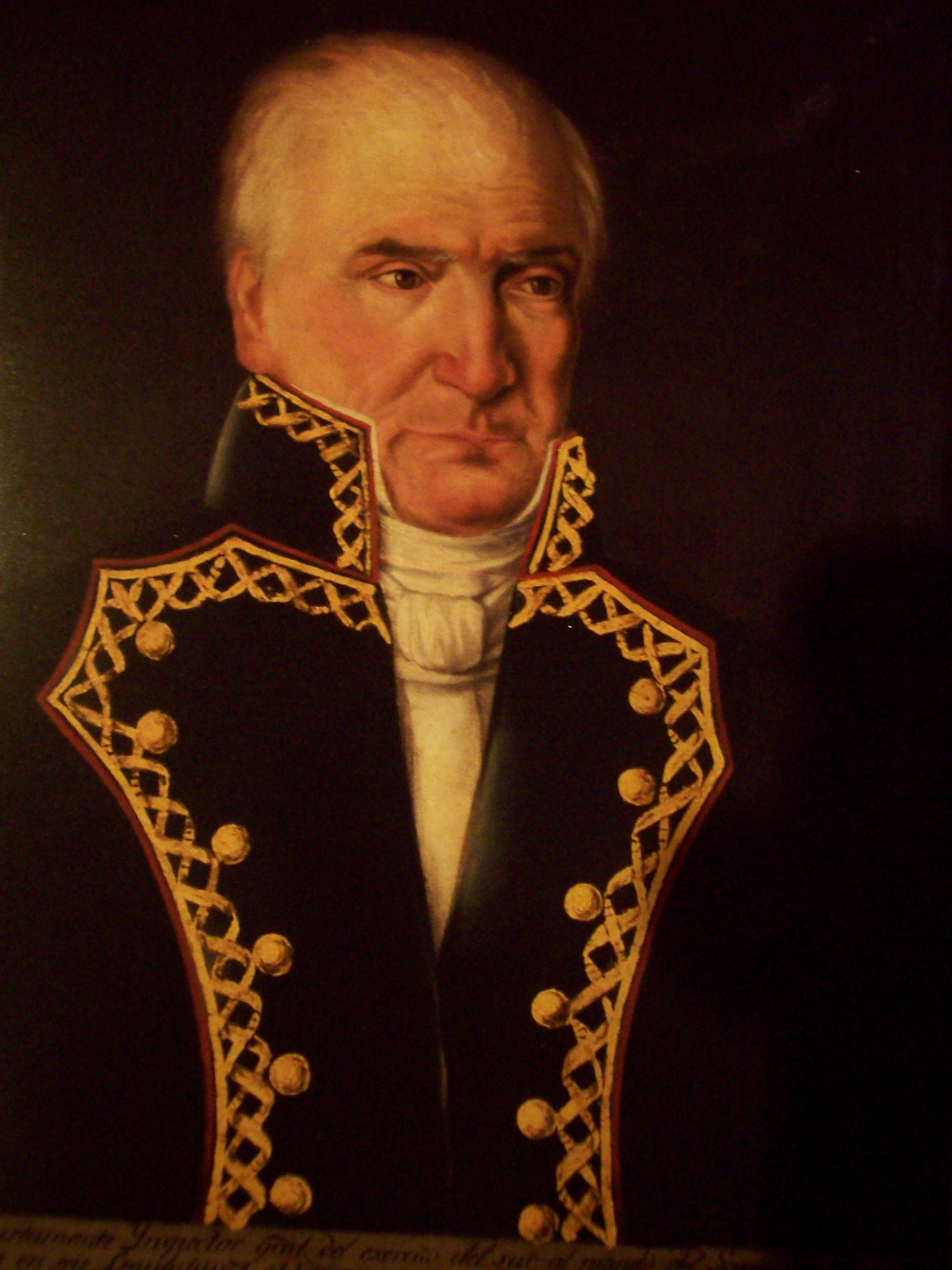 Carlos María de Bustamante. Anónimo 1836. Óleo sobre tela. Museo Nacional de Historia. Conaculta, INAH, México